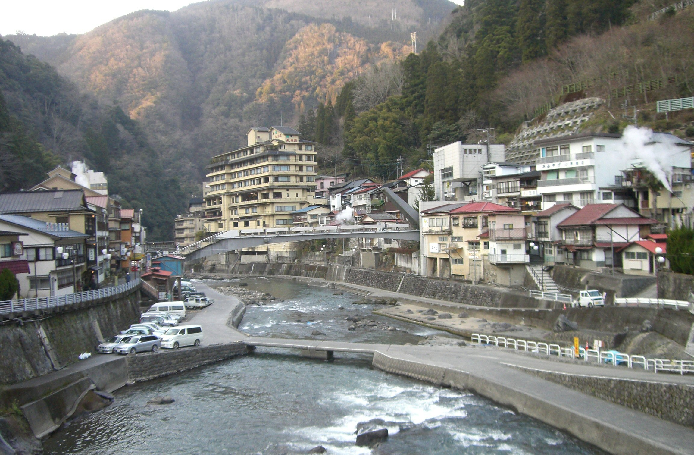 杖立温泉 Tsuetate-hotspring, Kumamoto, Japan